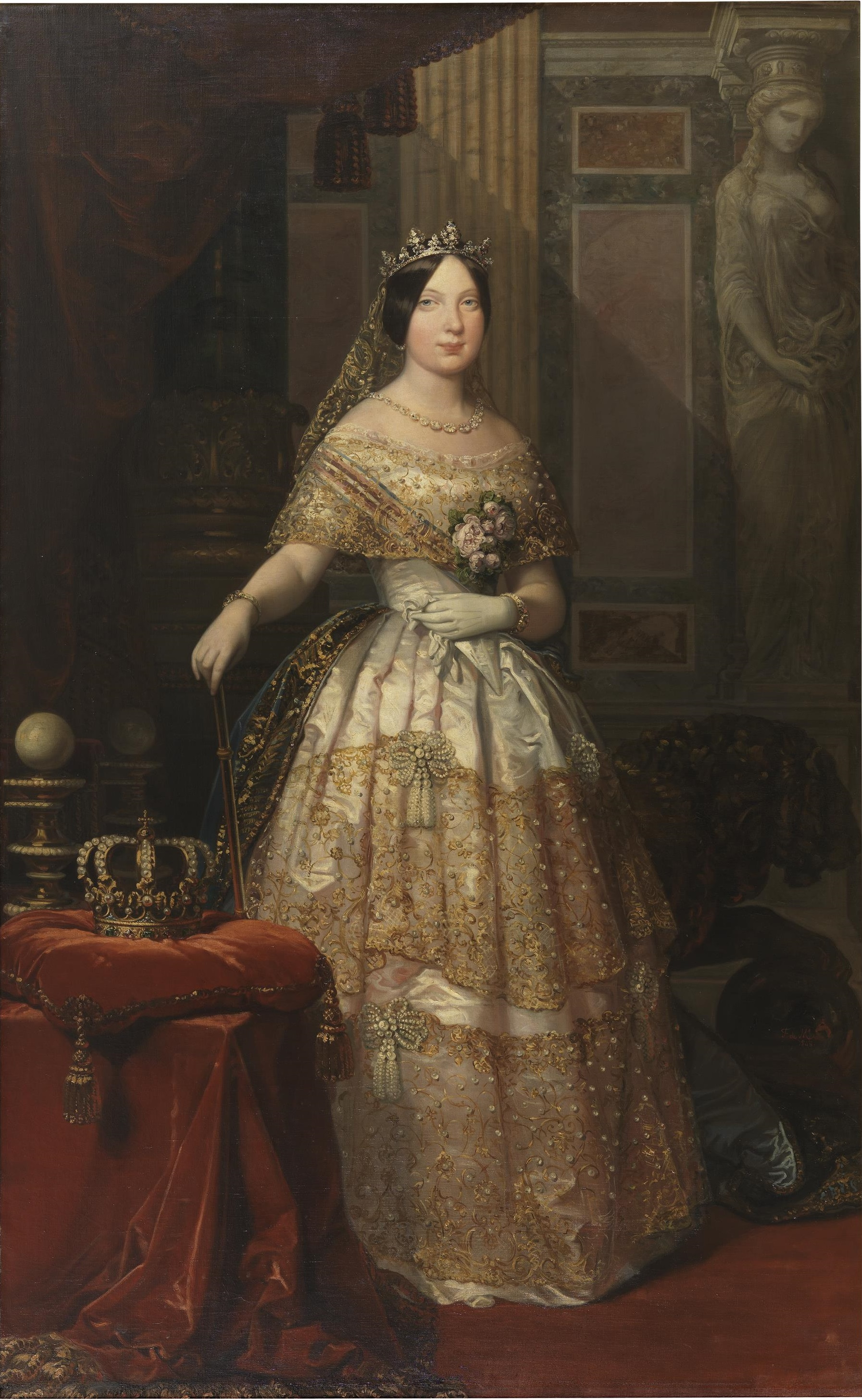 Retrato de la reina Isabel II de España (1830-1904), que fue la hija y heredera del rey Fernando VII y la madre de Alfonso XII.